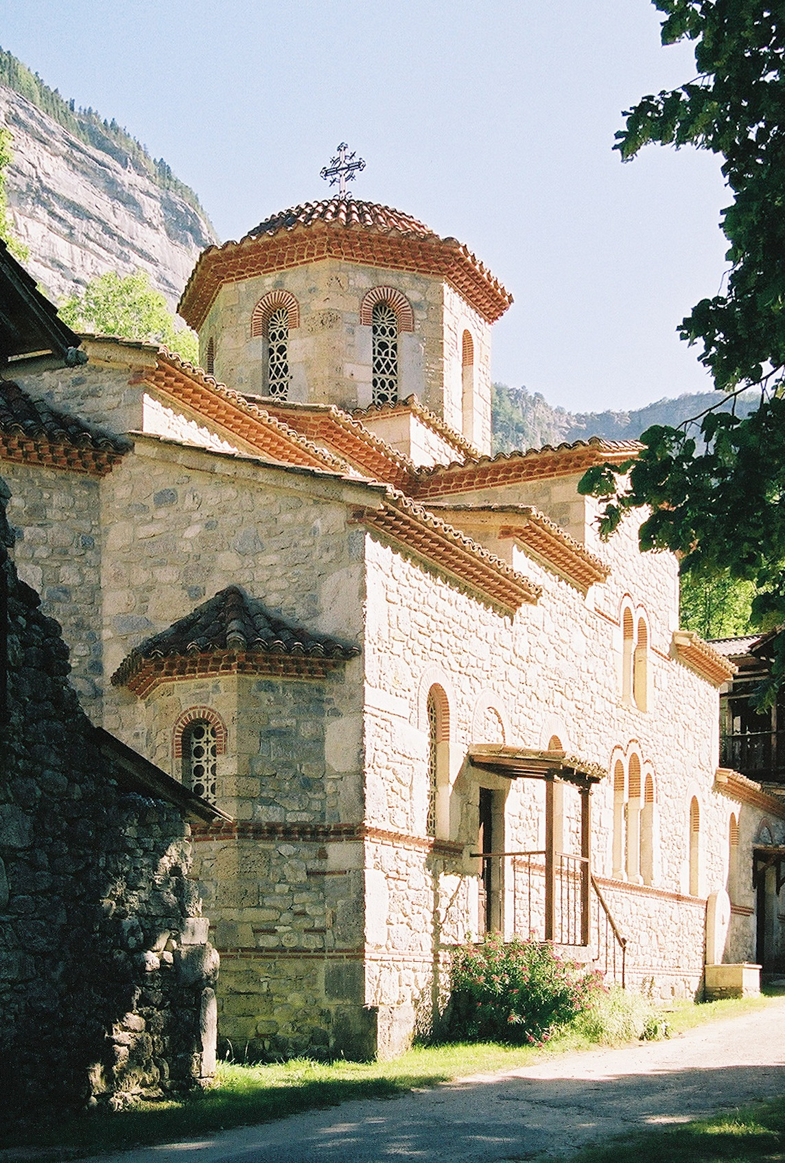 Монастырь святого Антония Великого в Дроме (Франция), подворье афонского монастыря Симонопетра.